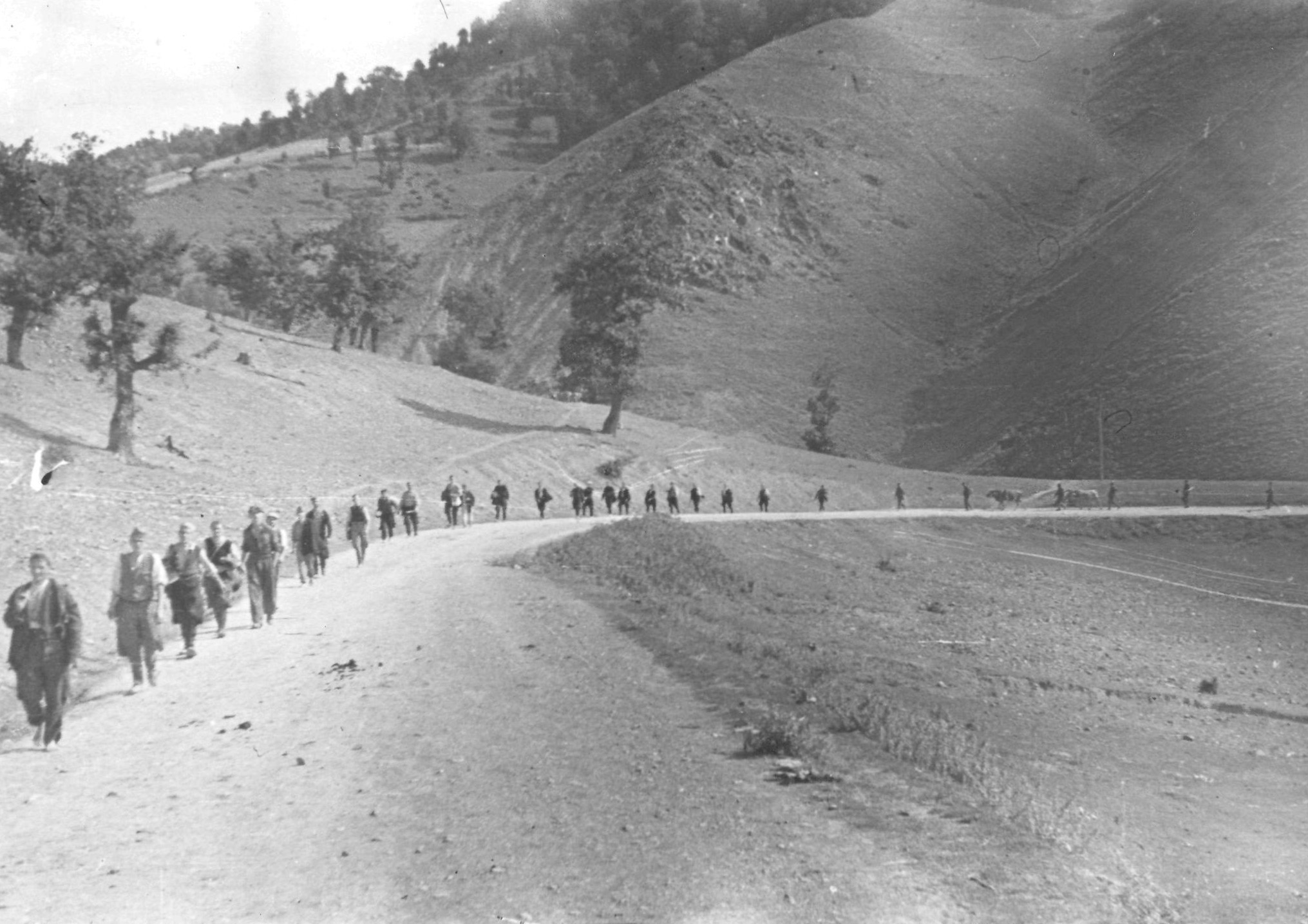 Srpski (latinica): Partizani u Jablanici avgusta 1944. Na slici se vidi kolona novih još uvek nenaoružanih boraca.